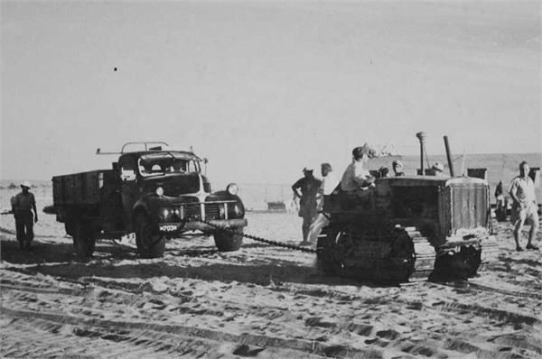 ביום העליה לנירים בנגב מכוניות רבות שקעו בחולות הסביבה וטרקטור הנקודה עוזר להוציאן